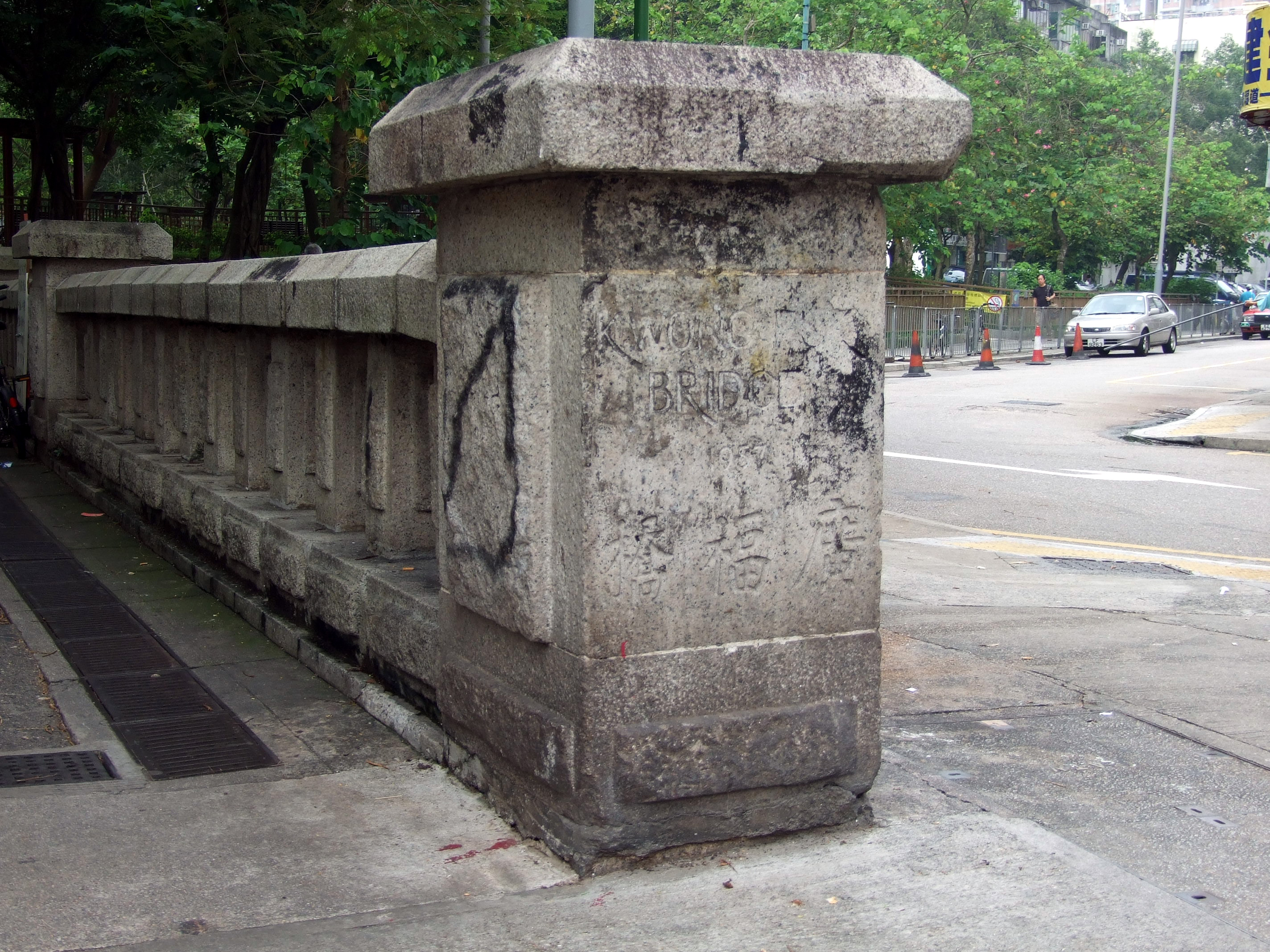 中文（香港）: 廣福橋1948年重修的橋頭石